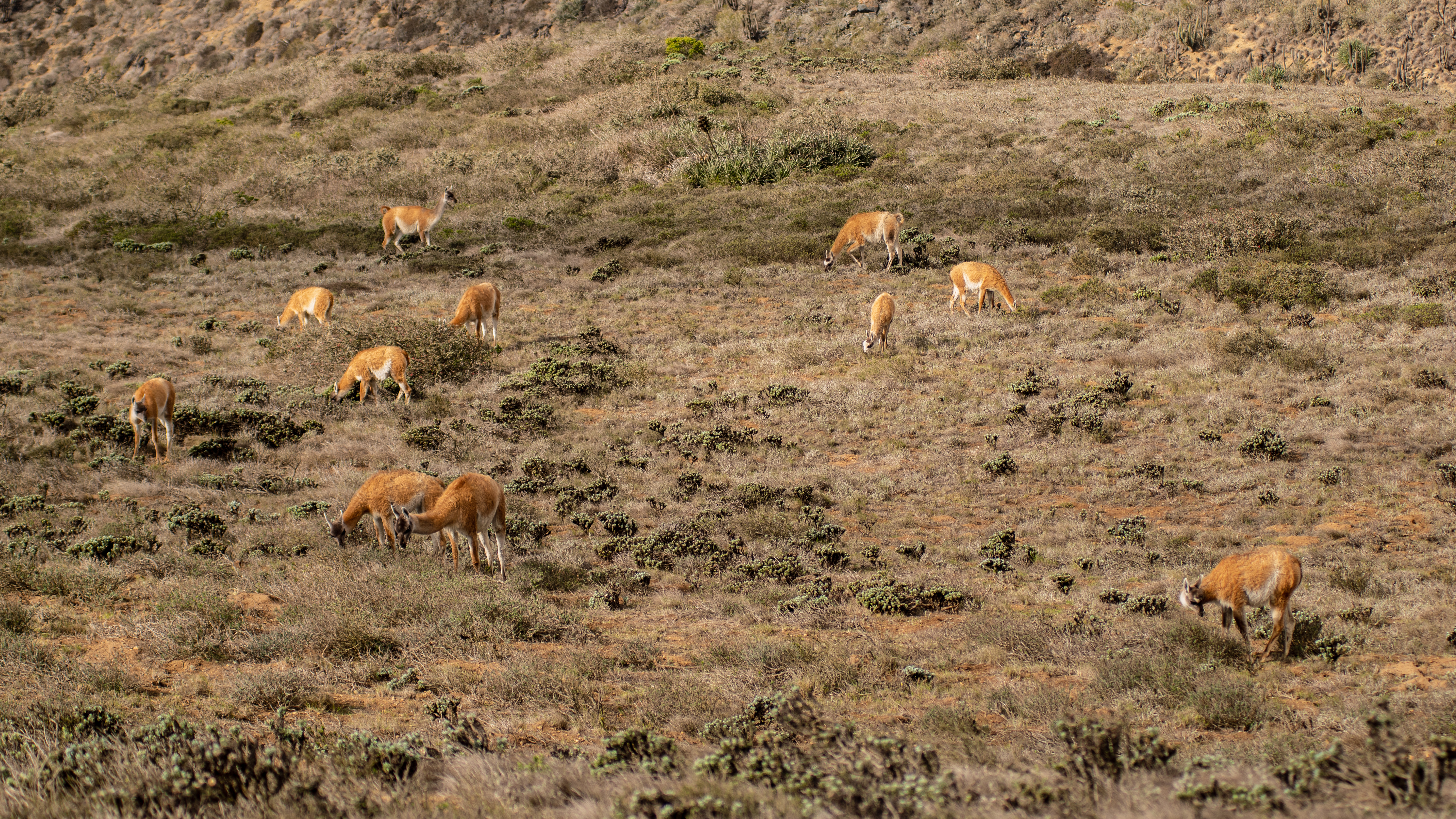 Lama guanicoe, típico guanaco observado en el Parque Nacional Bosque Fray Jorge. Pertenece a la familia Camelidae, propia de Latino America